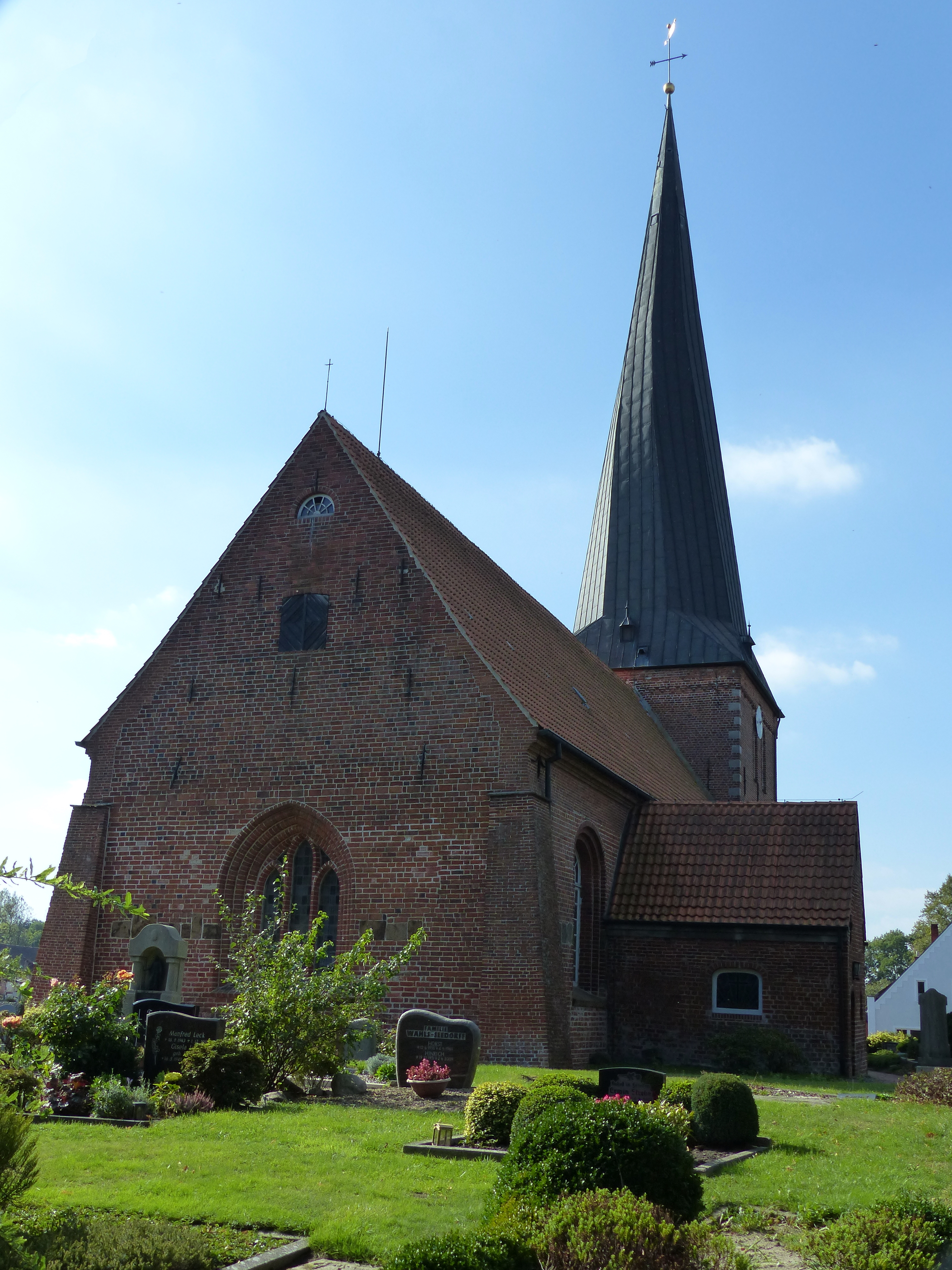 Dorfkirche in Sandstedt von Ostnordosten